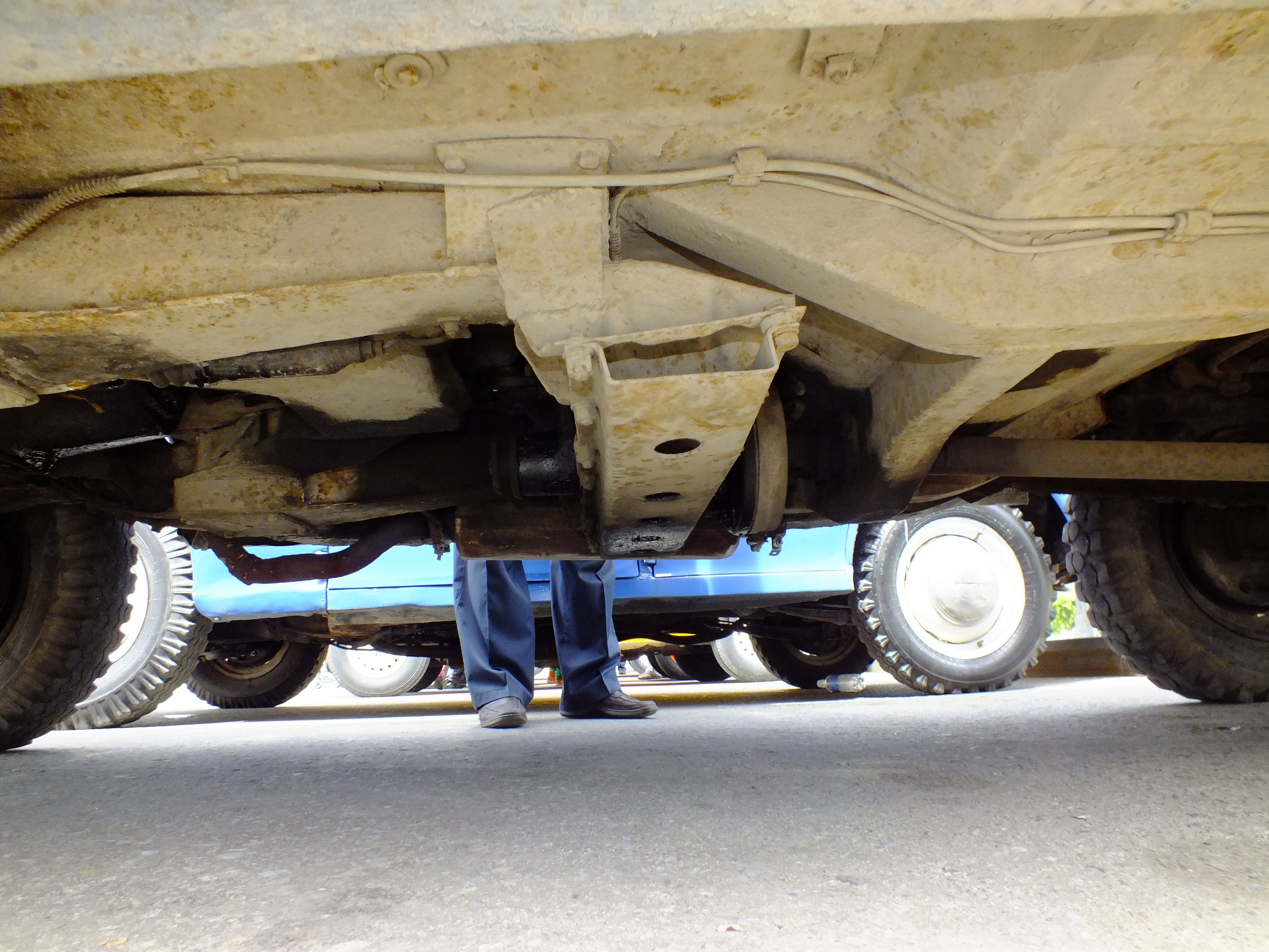 GAZ-M-72